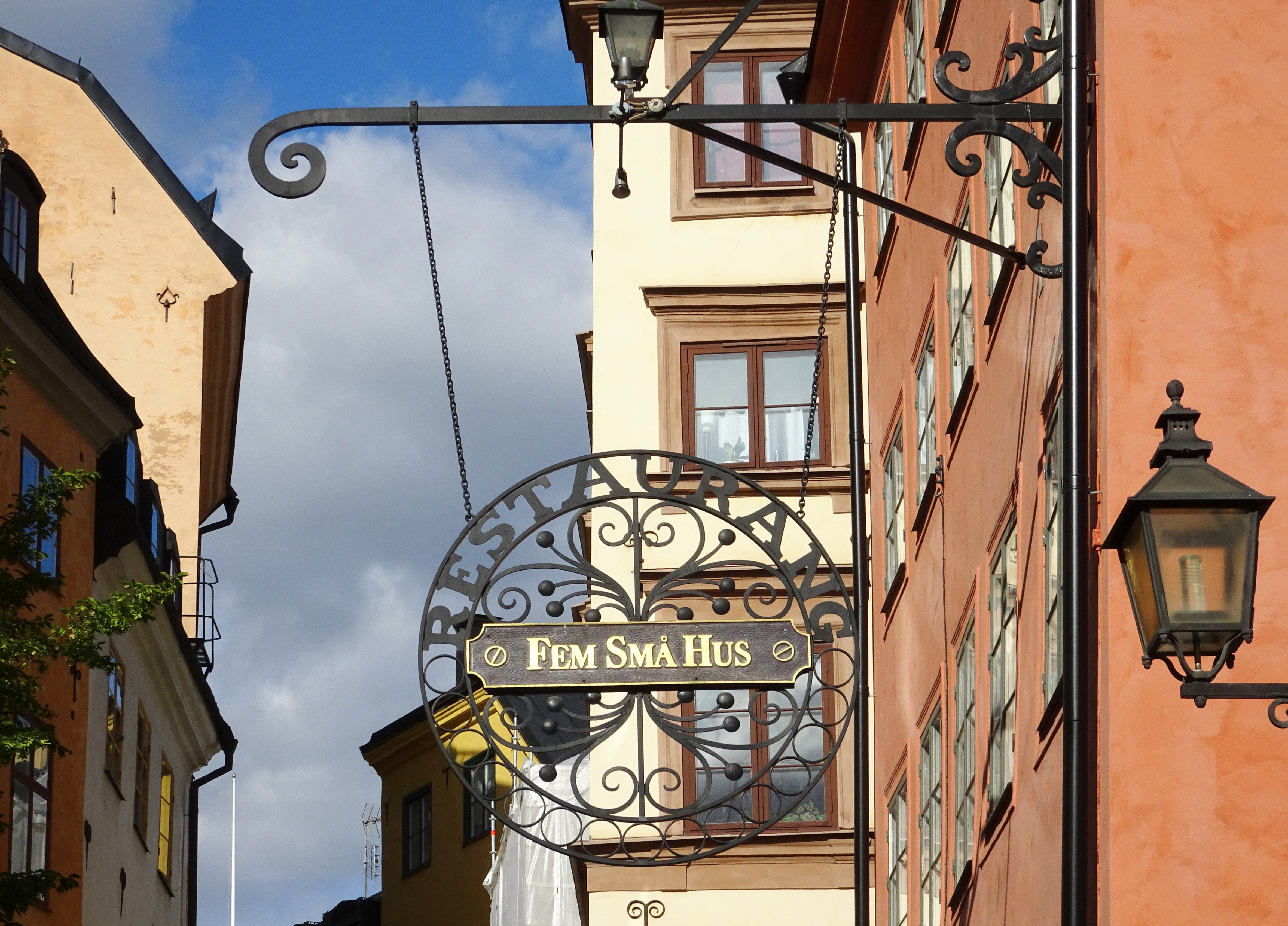 Fem Små Hus, Österlånggatan